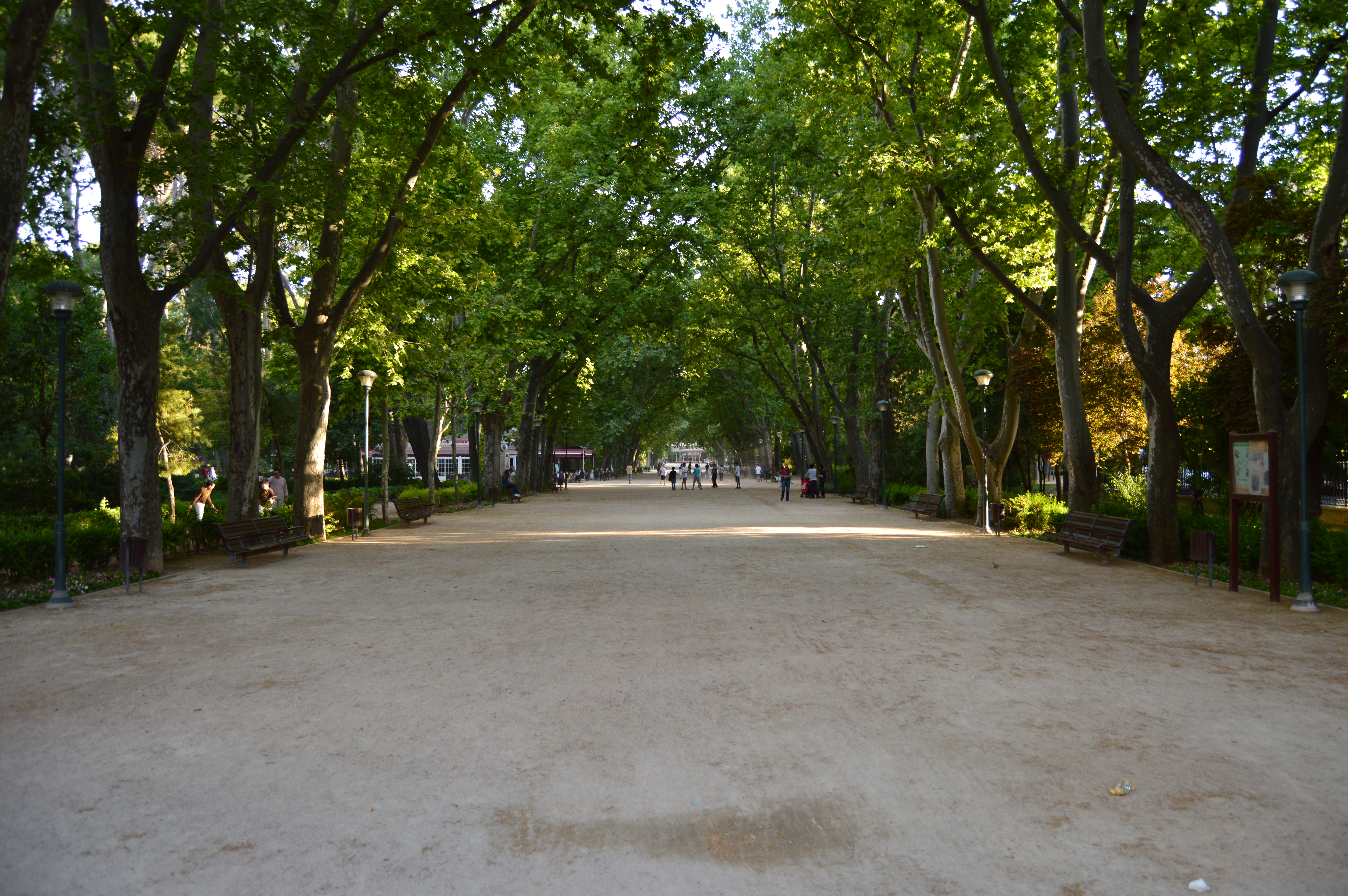 Paseo Central del Parque Abelardo Sánchez. Centro. Albacete